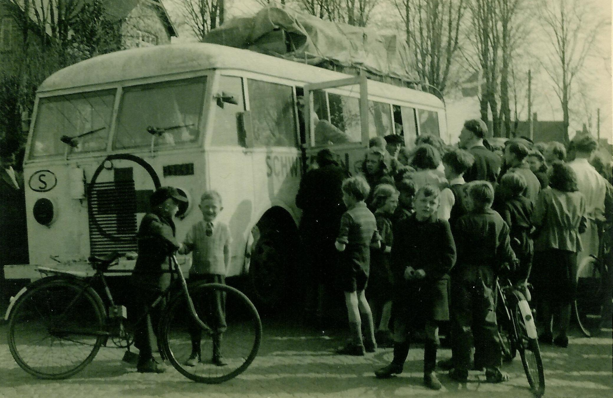 Bernadotte-aktionen. Svenske Røde Kors busser i Haderslev med danske jøder fra ghettoen Theresienstadt i april 1945 på vej til Sverige Dato: April 1945 Sted: Åbenråvej, Haderslev Se flere billeder her: Download and rights: More about The Museum of Danish Resistance (Frihedsmuseet)